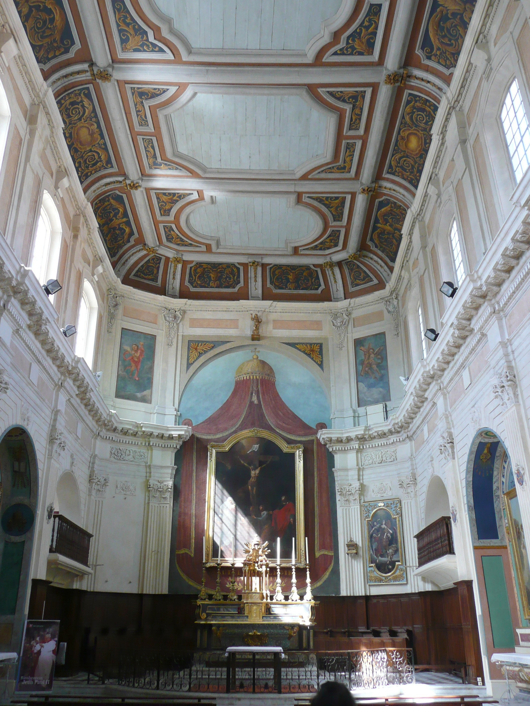 A Martigues (Bouches-du-Rhône, France), dans le quartier de l'Île, intérieur de l'église La Madeleine.